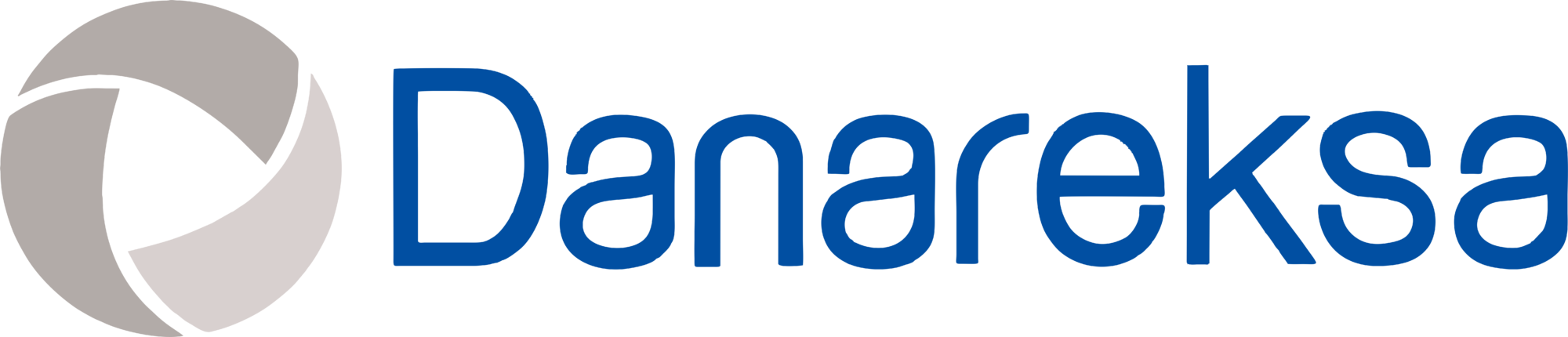 Logo Danareksa